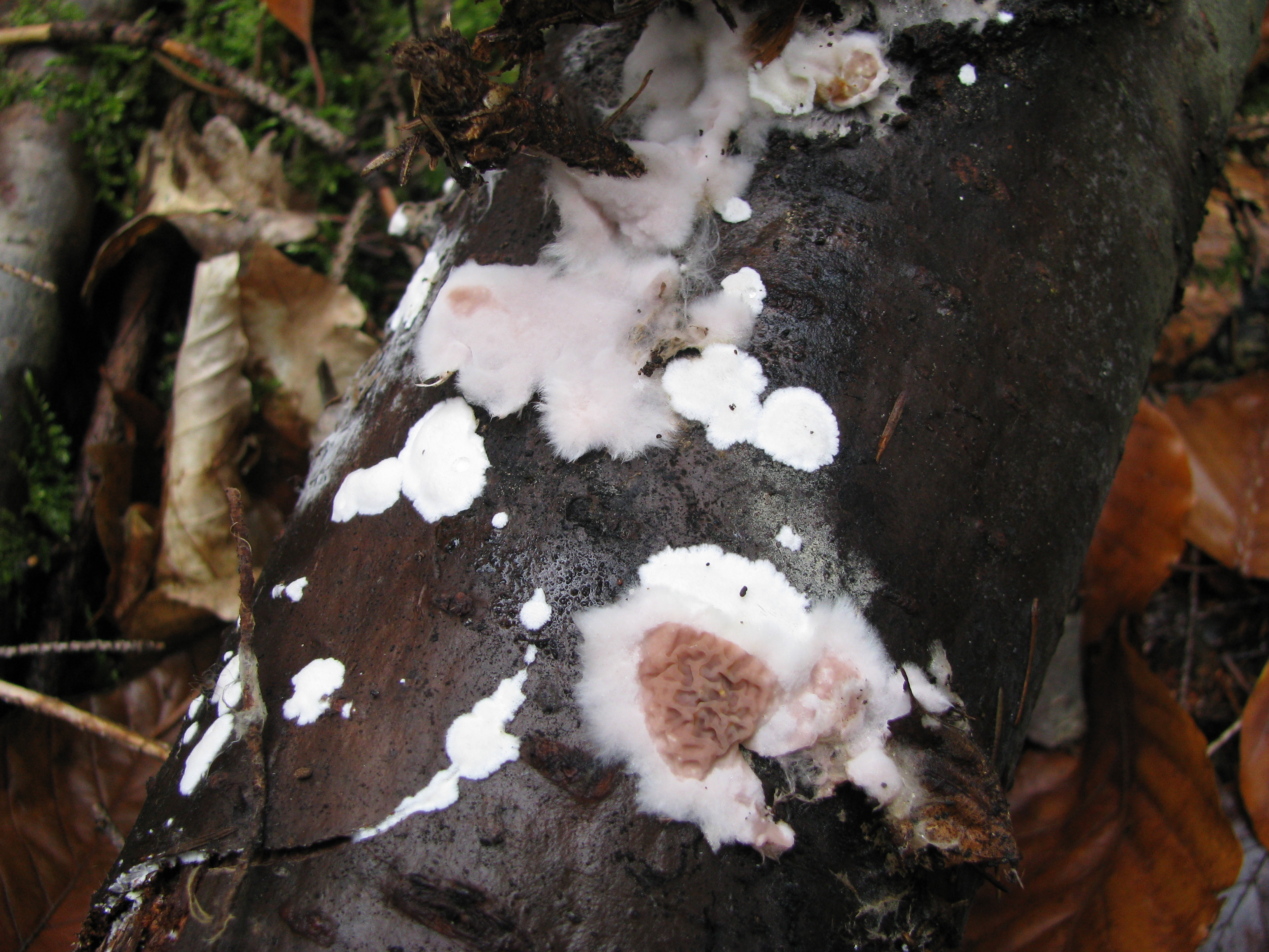 Wilder Hausschwamm (Serpula himantiodes) fotgraphiert im Langenlonsheimer Wald